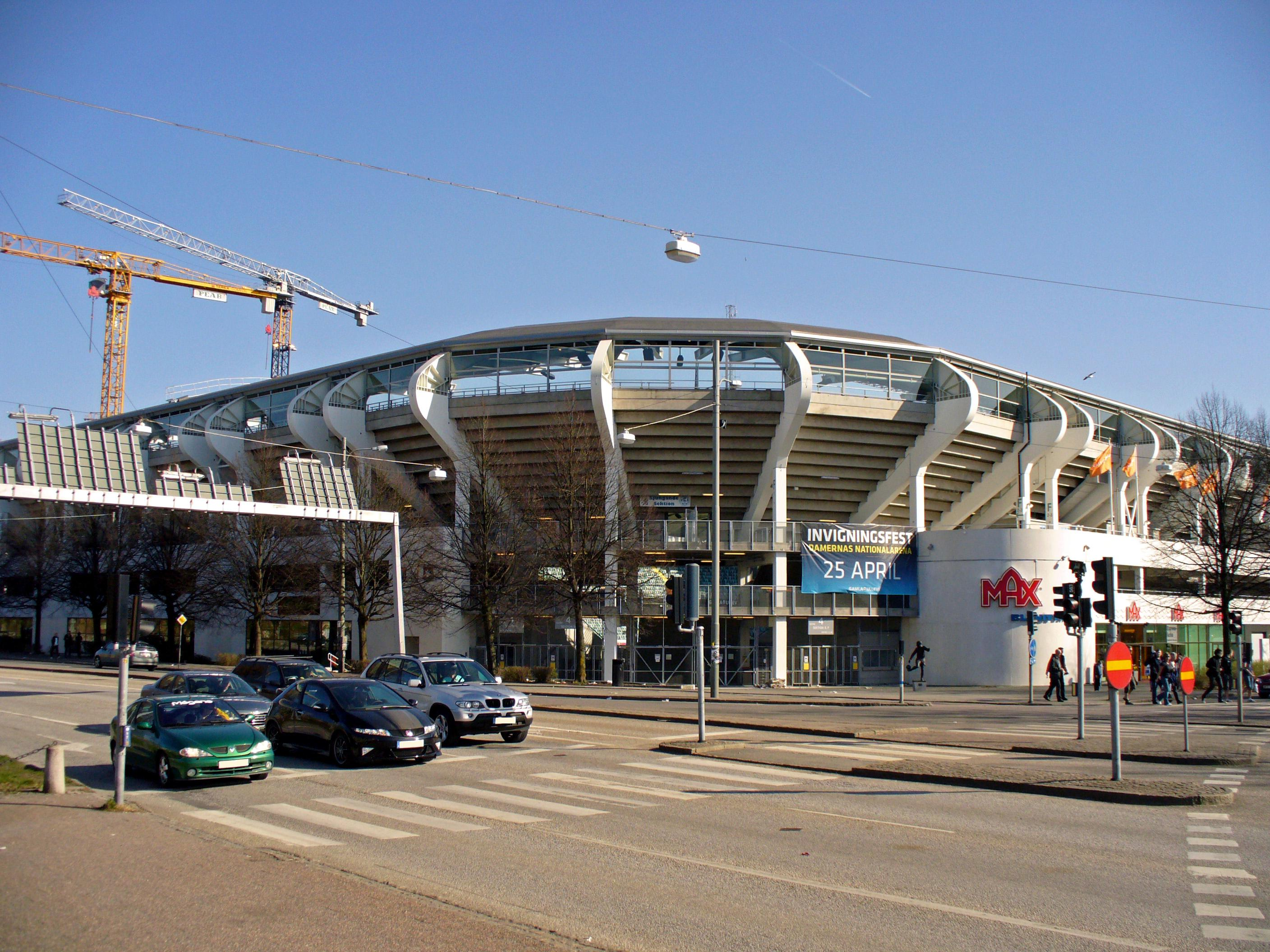 Gamla Ullevis hörn mot centralstationen på påskafton 2009.